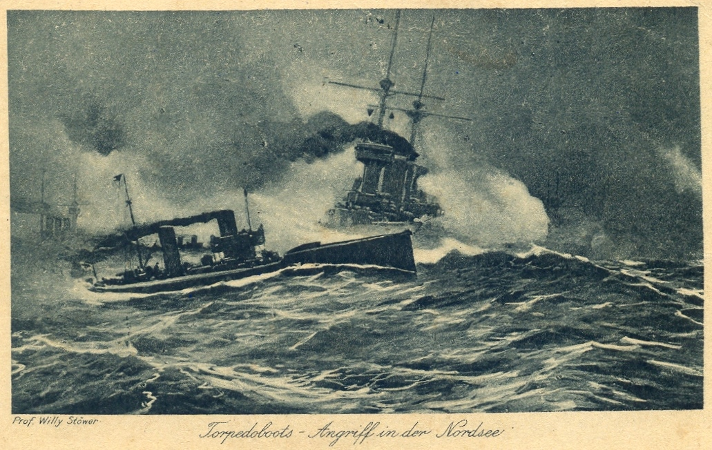 "Миноносцы - атака в Северном море". Лицевая сторона германской художественной карточки (открытки)(Künstlerkarte von Willy Stöwer). Надписи под изображением: "Proff. Willy Stöwer", "Torpedoboots - Angriff in der Nordsee".